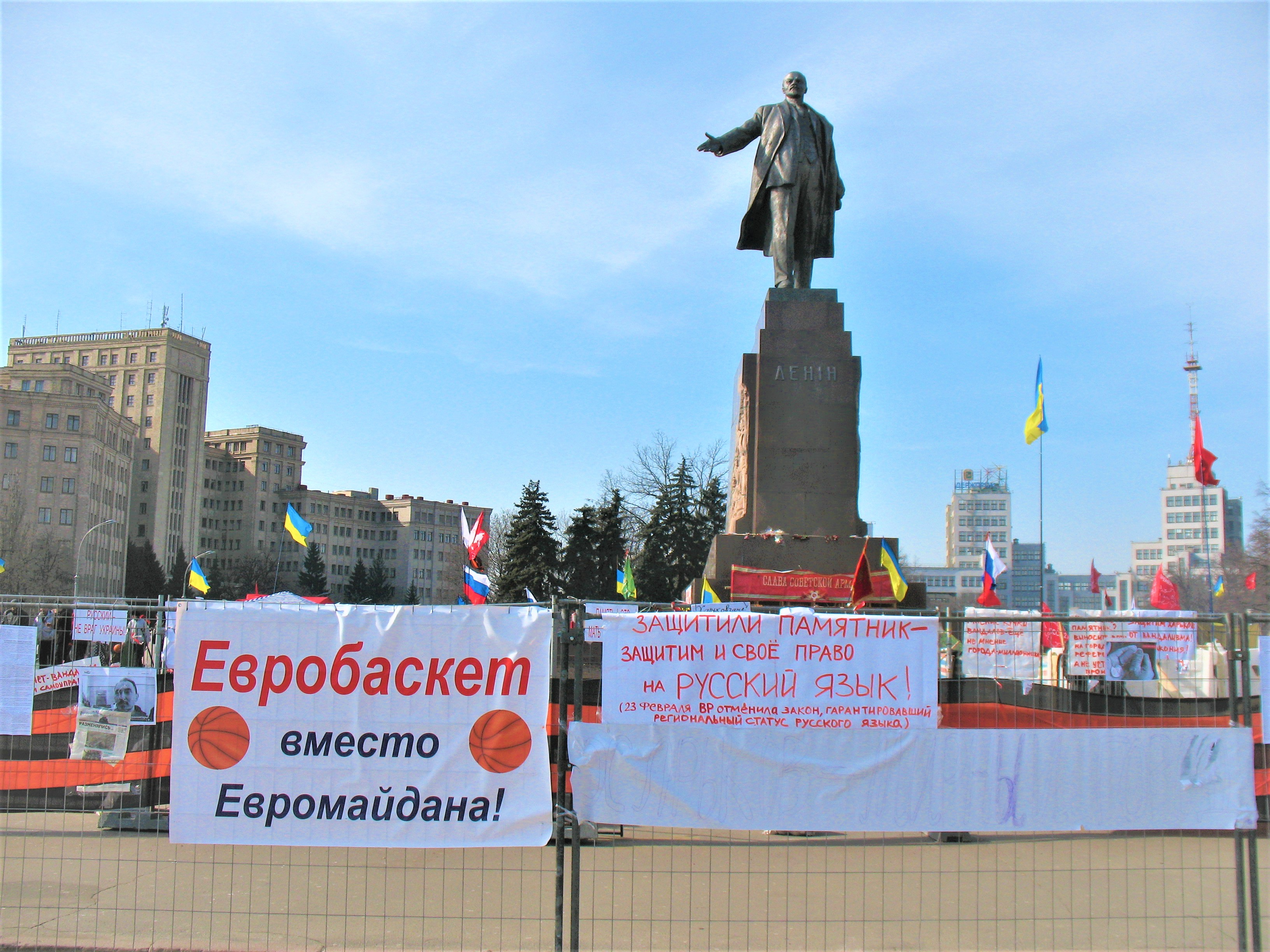 Харьков, 28 февраля. Оборона памятника Ленину горожанами от приехавших в город 22 февраля боевиков "Правого сектора", которые пытаются его снести. "Защитили памятник - защитим и своё право на русский язык!"